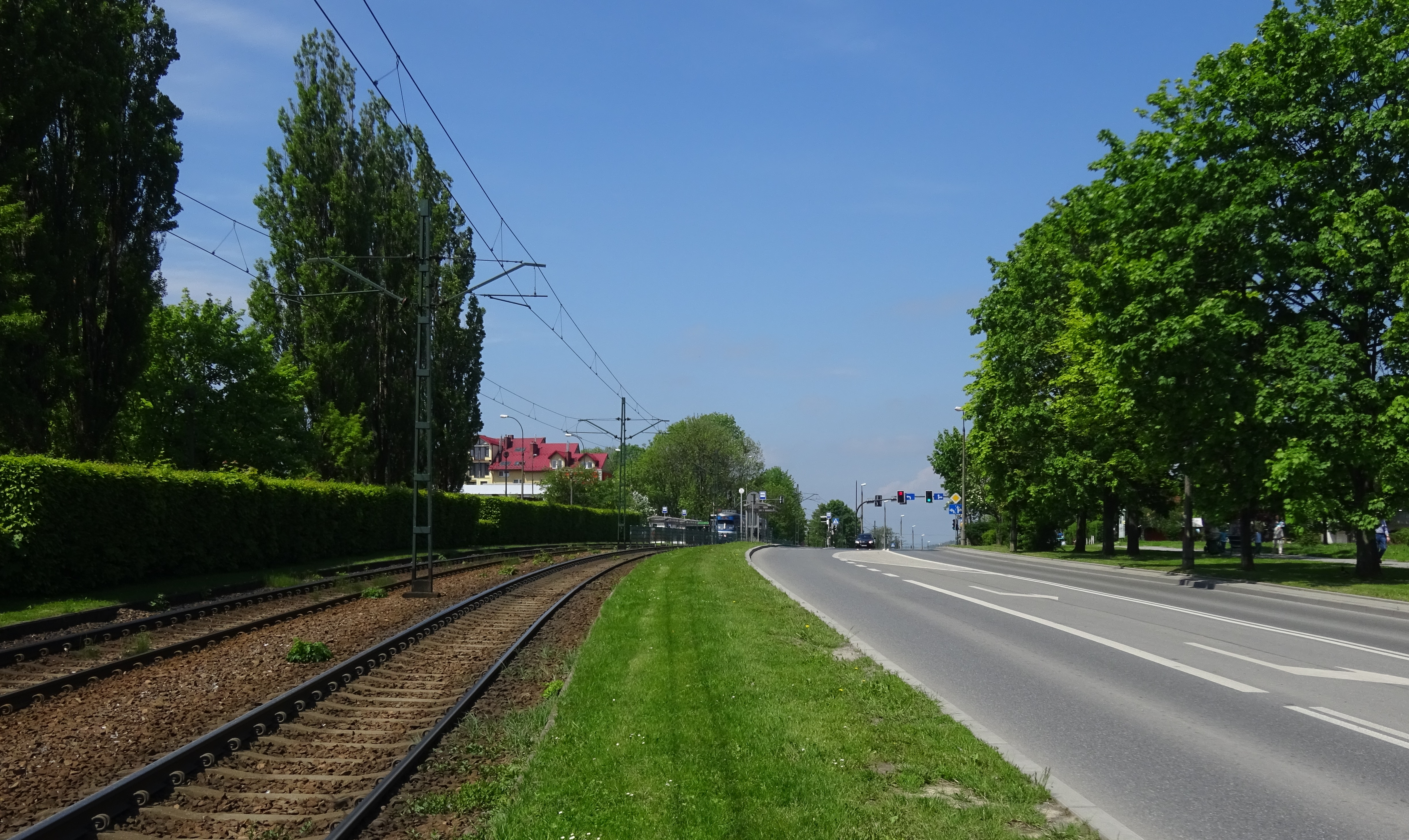 Ulica ks. Kazimierza Jancarza w Krakowie, widok odcinka między skrzyżowaniami z ulicą Miśnieńską i Łęczycką w kierunku zachodnim. 2019